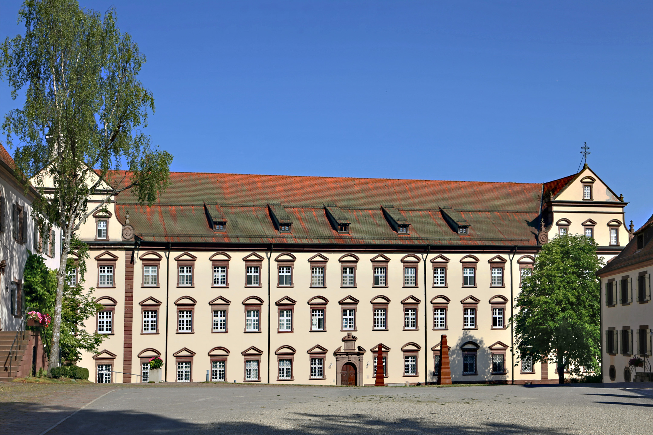 Konventgebäude der Klosteranlage Kirchberg, ein ehemaliges Dominikanerinnen-Kloster. Heute dient es als evangelische Tagungsstätte. Berneuchener Haus.